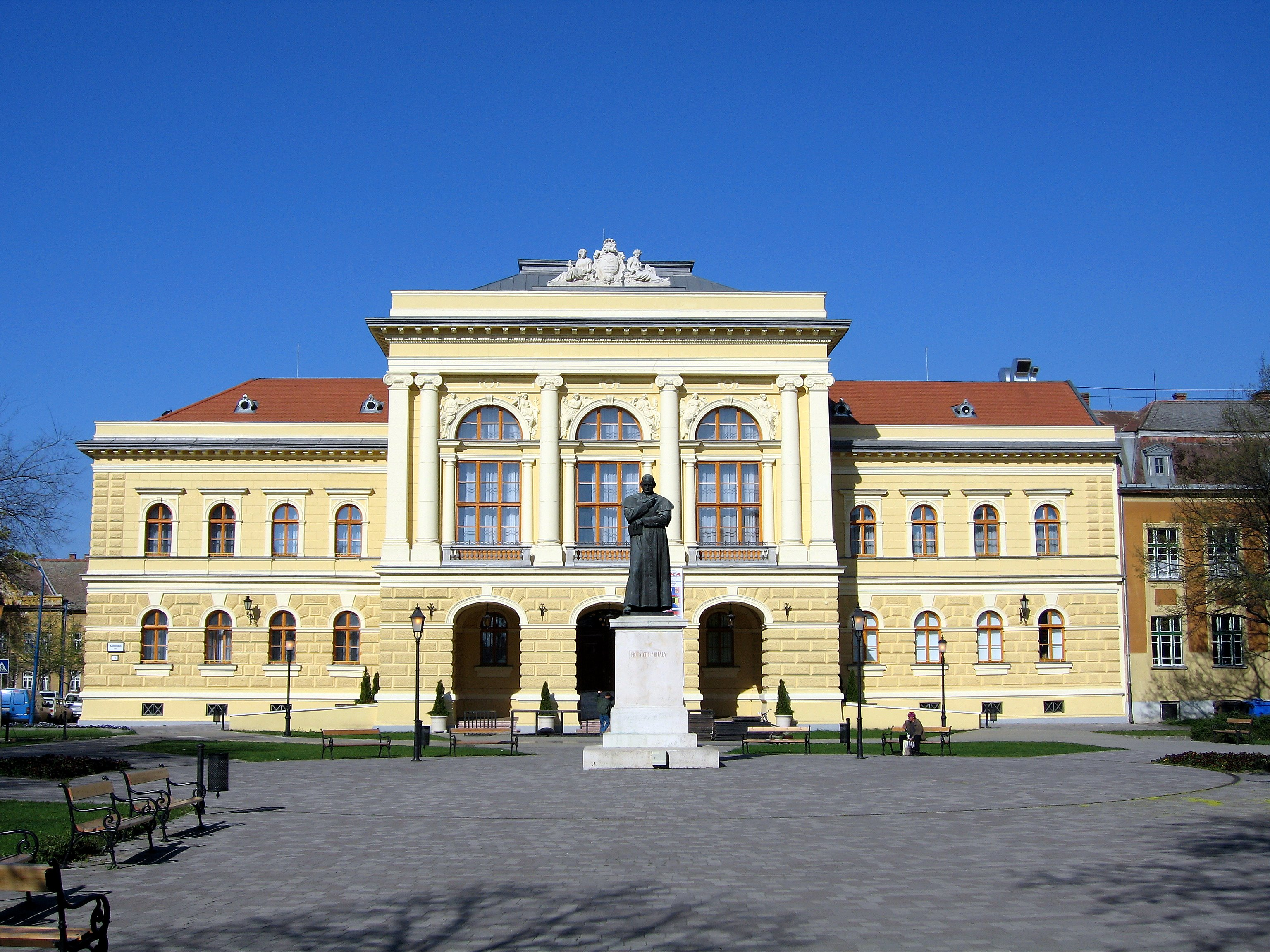 Szentes: volt Megyeháza épülete, elől: Horváth Mihály (Kisfaludi Strobl Zsigmond)